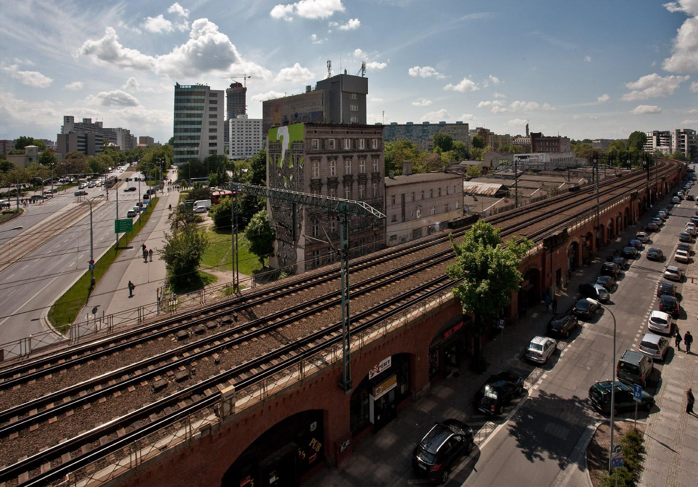 Estakada kolejowa - widok na zachód. W tle początki południowego city.